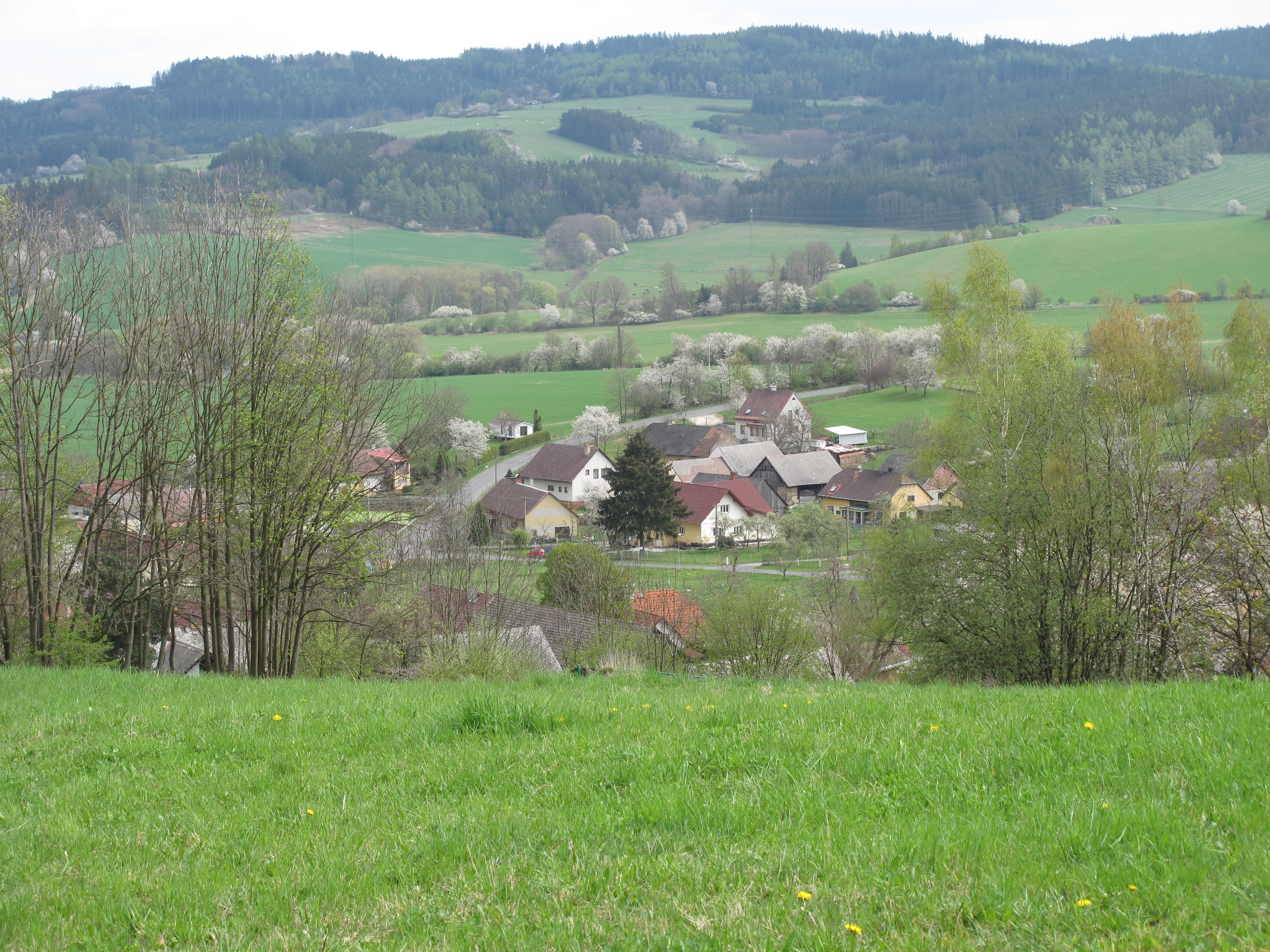 Klenová. Okres Klatovy, Česká republika.